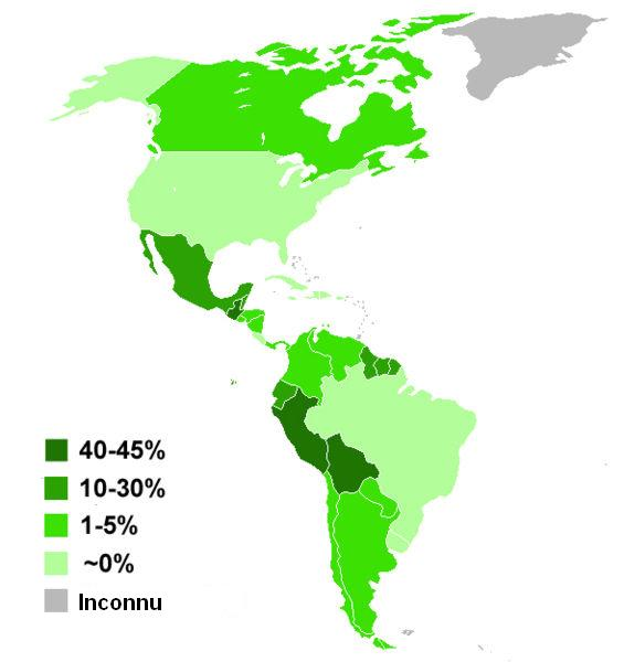 Représentation des populations amérindiennes autochtones en Amérique.